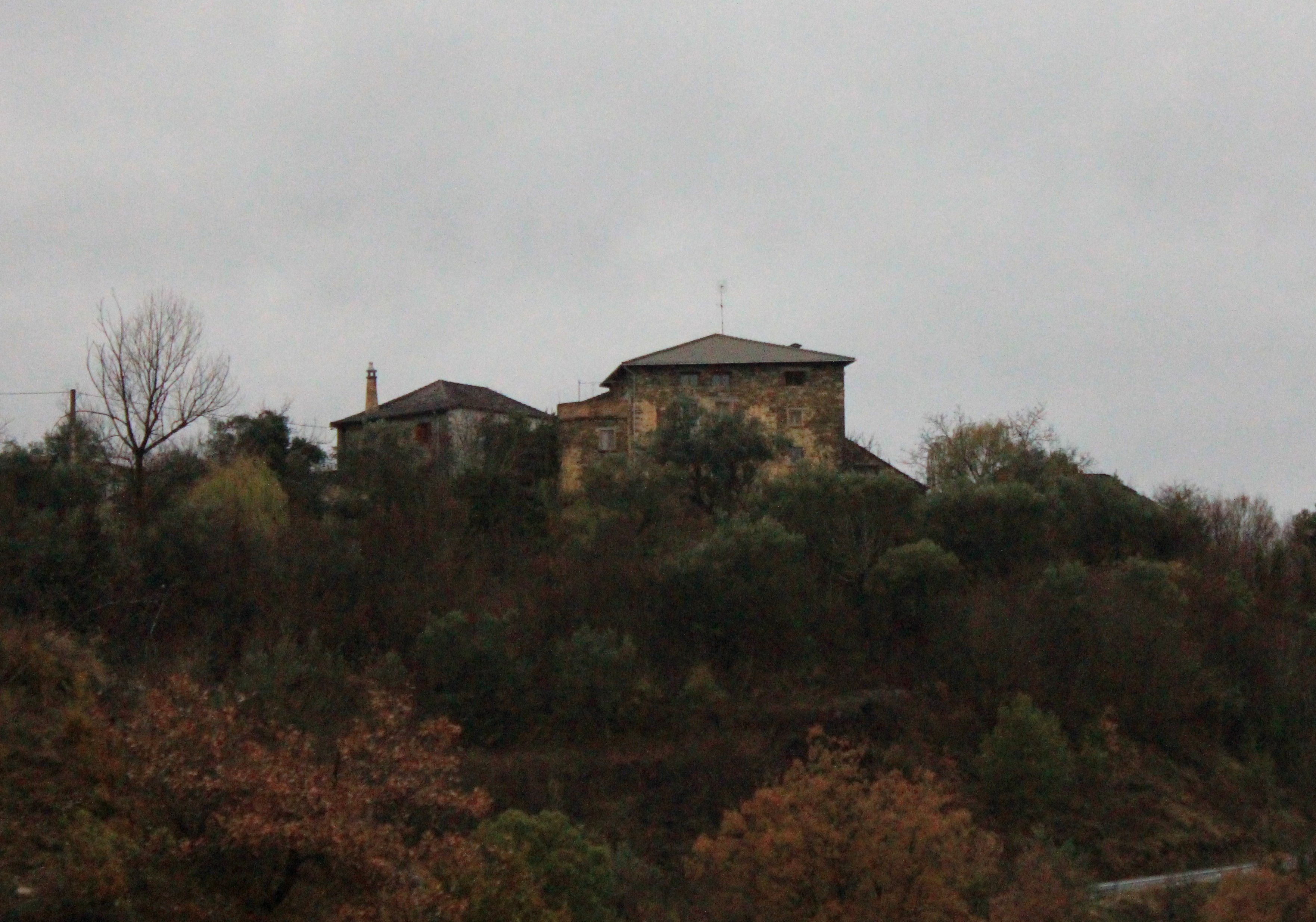 Aragonés: O Pocino de Charo (A Fueva, Sobrarbe).